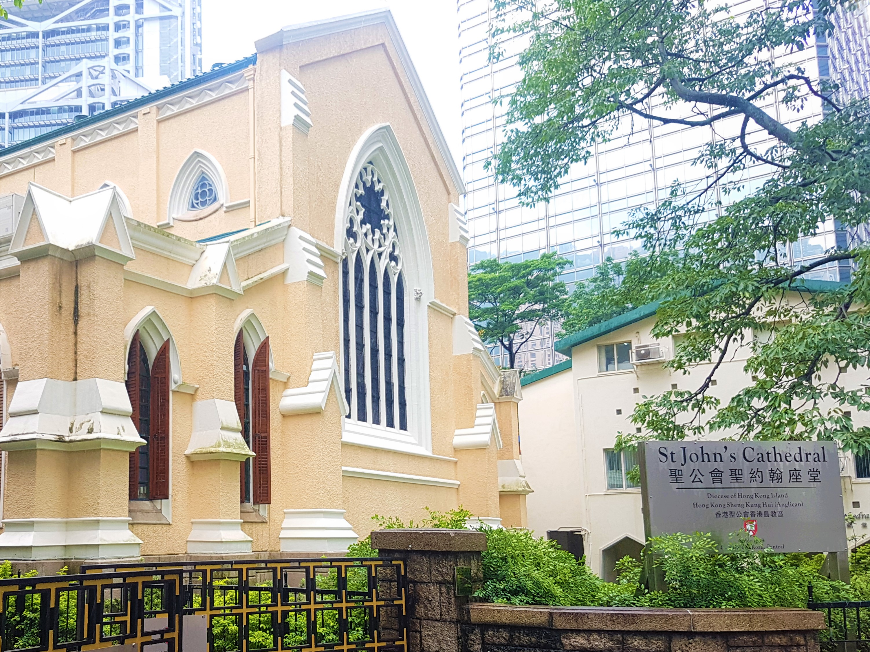 Katedral Santo Yohanes (Hong Kong)